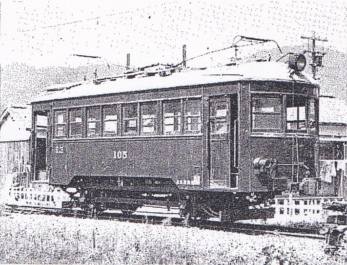 名鉄モ100形電車（2代）。谷汲鉄道デロ1形として1926年新製。名鉄揖斐線黒野駅にて撮影。